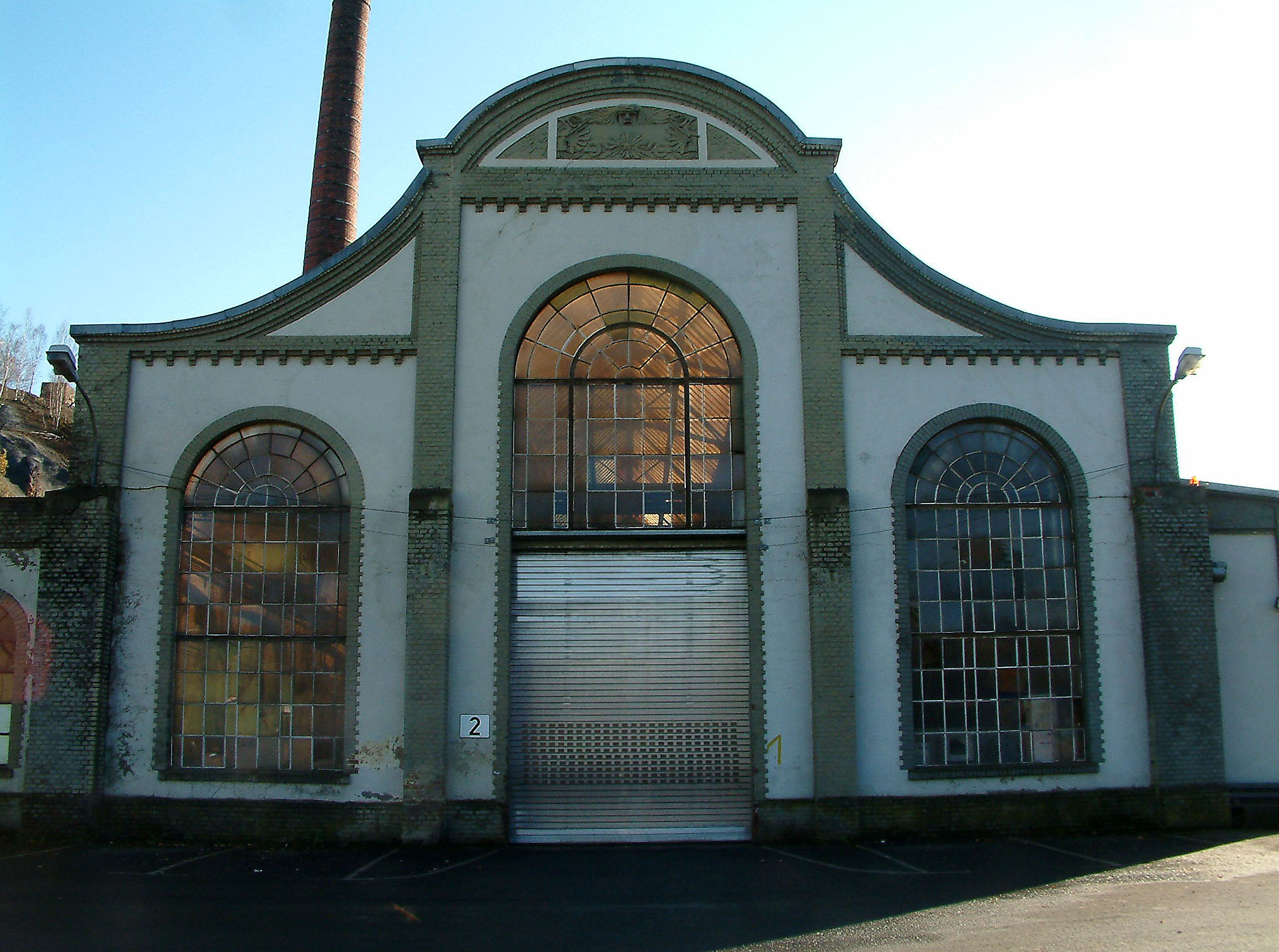 Hallenfassade der ehemaligen Charlottenhütte in Niederschelden